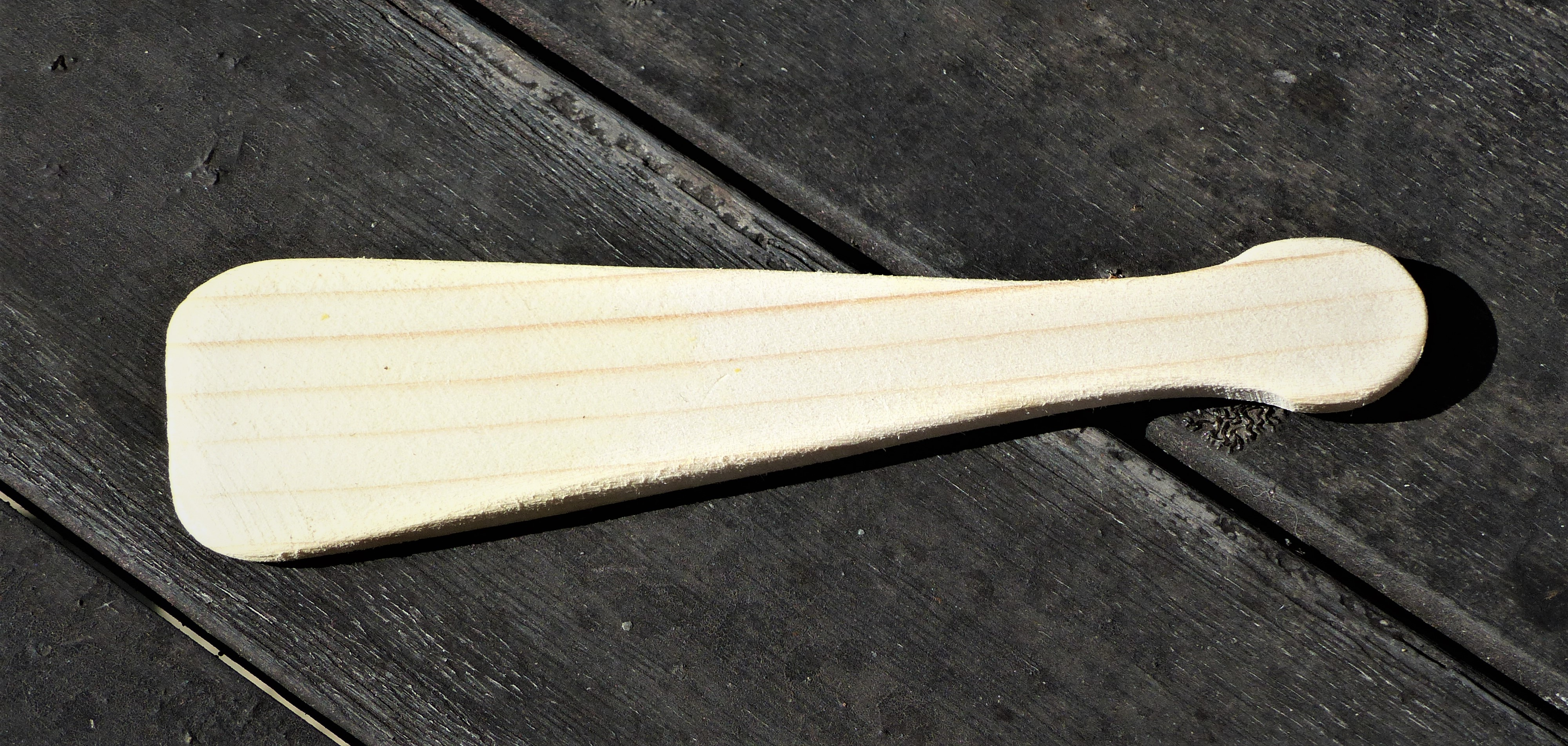 Lapocka. A Csángó Bál (2018) evőeszköze, kanál. A túrós puliszkához. Méreteː 15 cm x 4 cm.